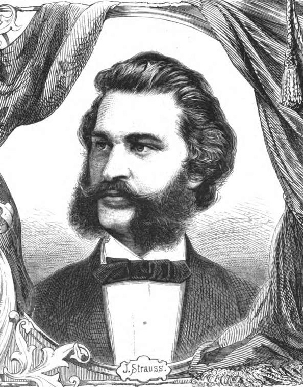 Johann Strauß (Sohn), berühmter österreichisch-deutscher Komponist.